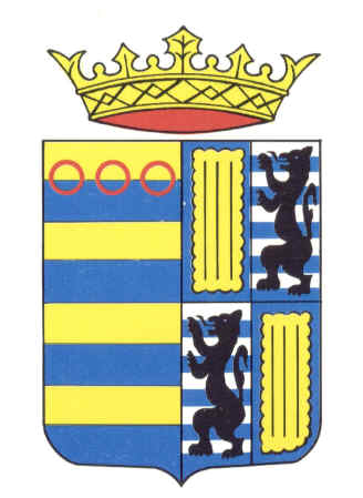 armoiries de la ville de Steenvoorde département du Nord France.